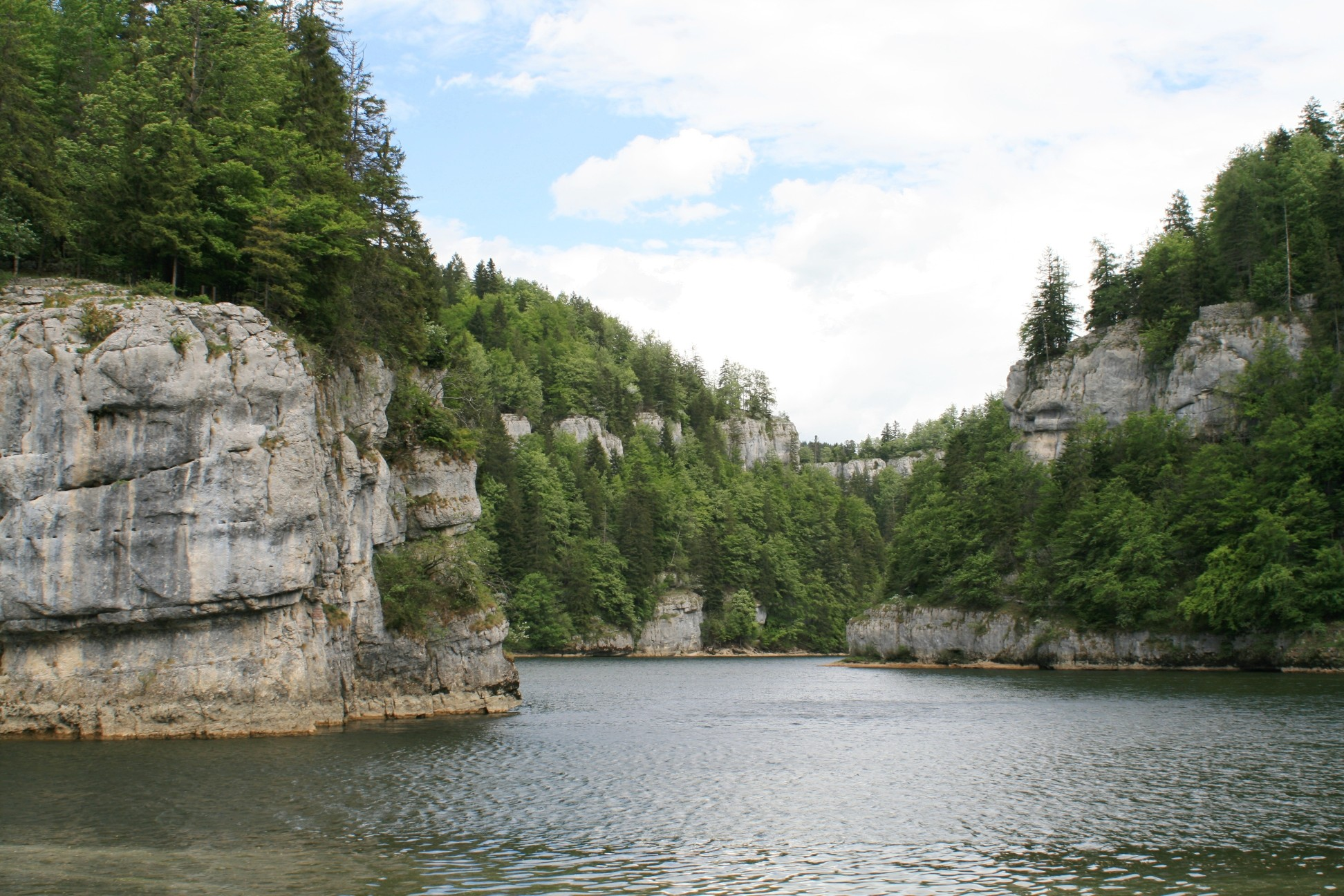 Saut du Doubs - canyons